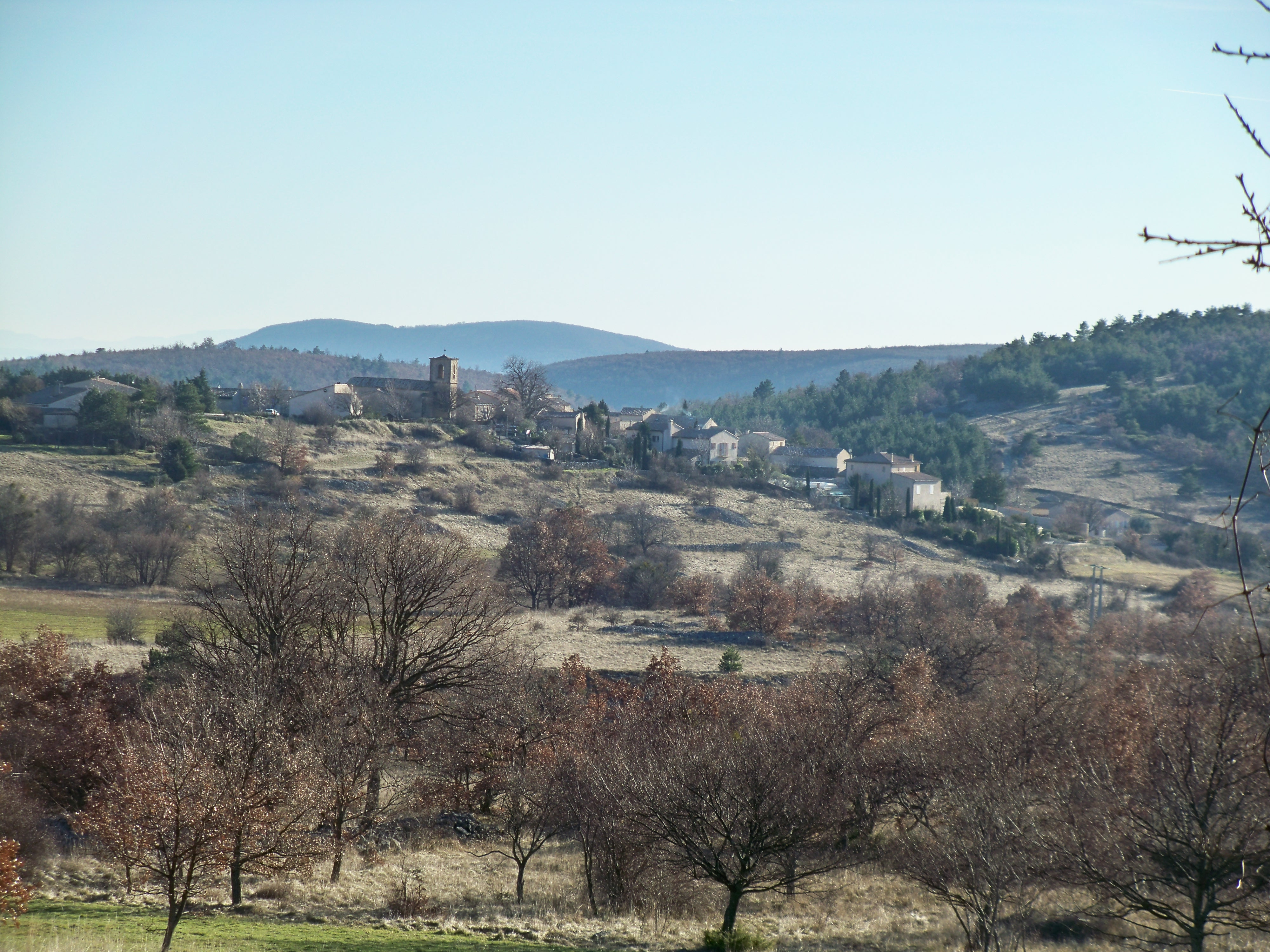 Vue générale sur L'Hospitalet (04), France